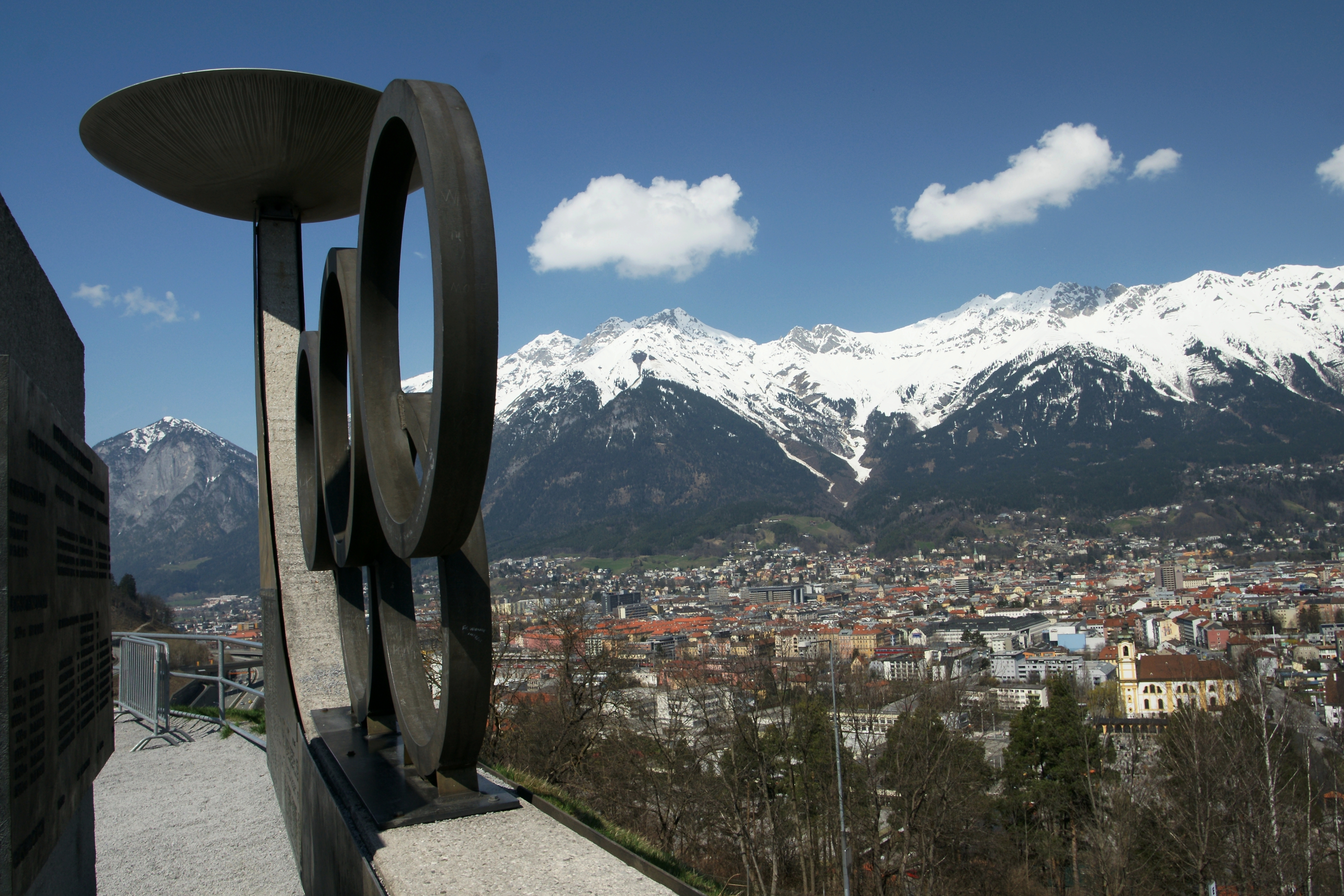 Die Olympische Ringe unter der Bergiselschanze in Innsbruck.